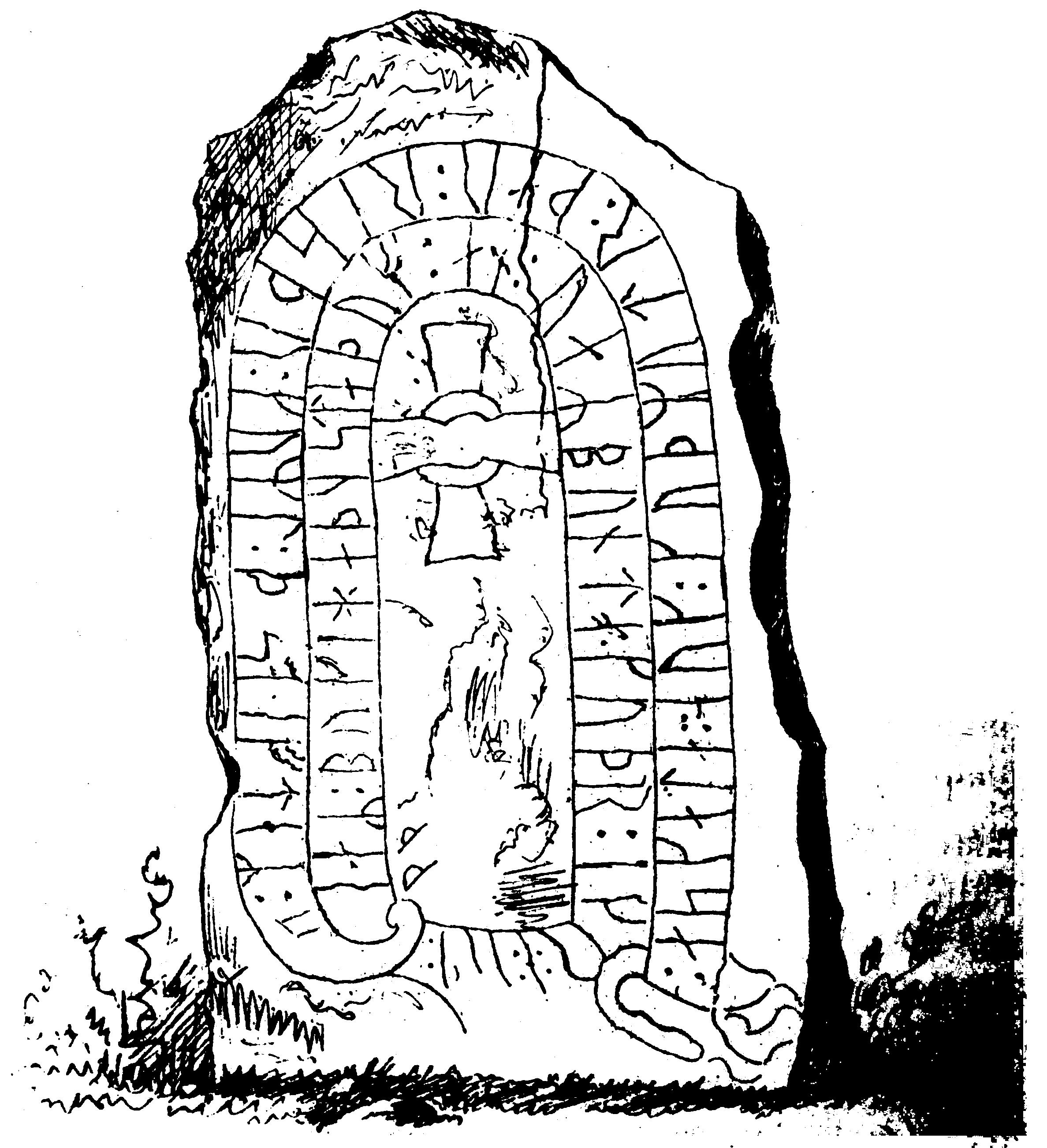 Östergötlands runinskrifter 94 vid Harstads ödekyrkogård i Harstads socken (som senare uppgick i Väderstads socken) i Östergötland. Teckning i "Utdrag af Antiqvitets-Intendenten P. A. Säves afgifna berättelse för år 1861", publicerad i Antiqvarisk tidskrift för Sverige band 1, 1864.